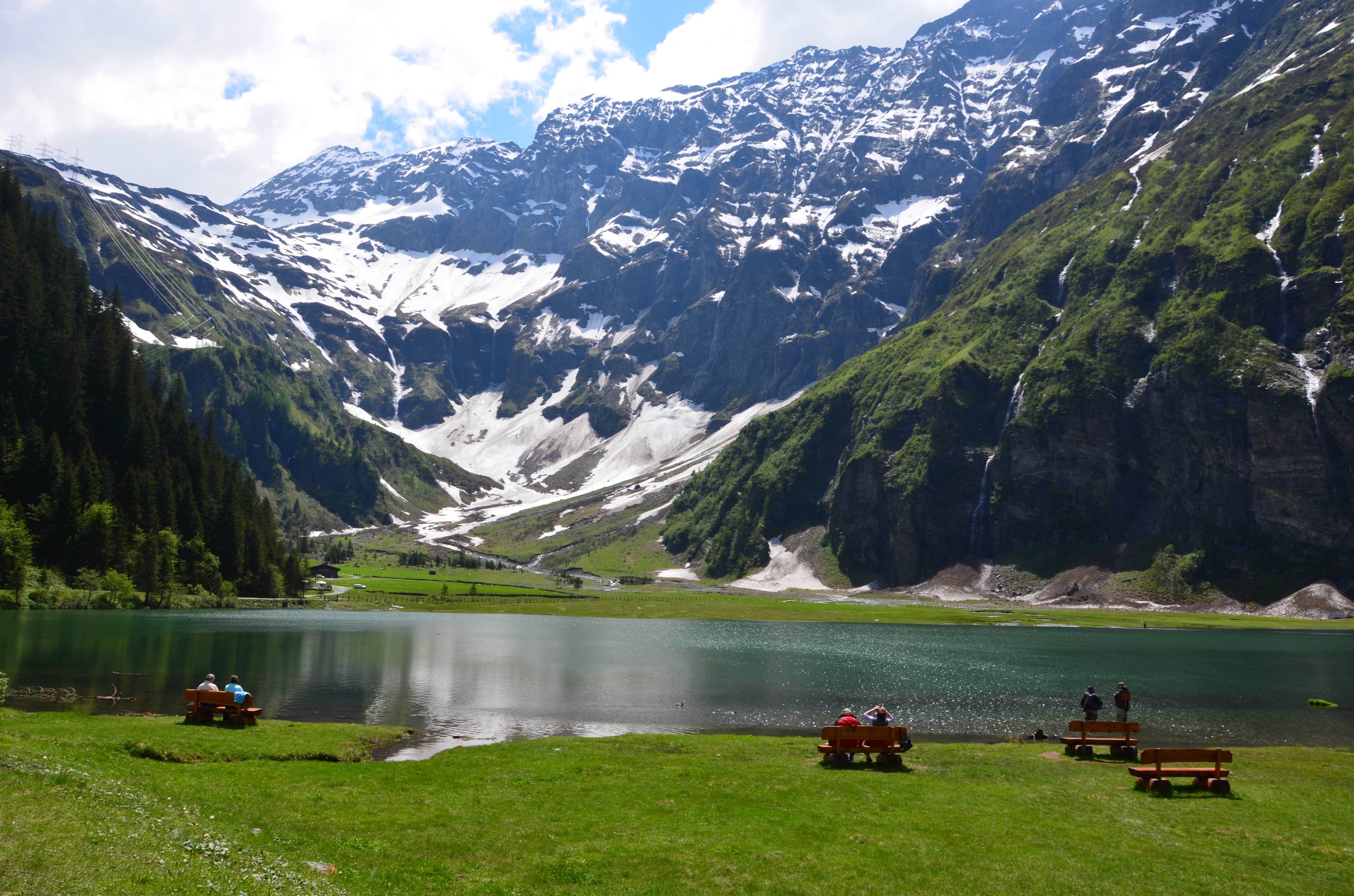 Hintersee im Felbertal, hohe Tauern (Österreich)